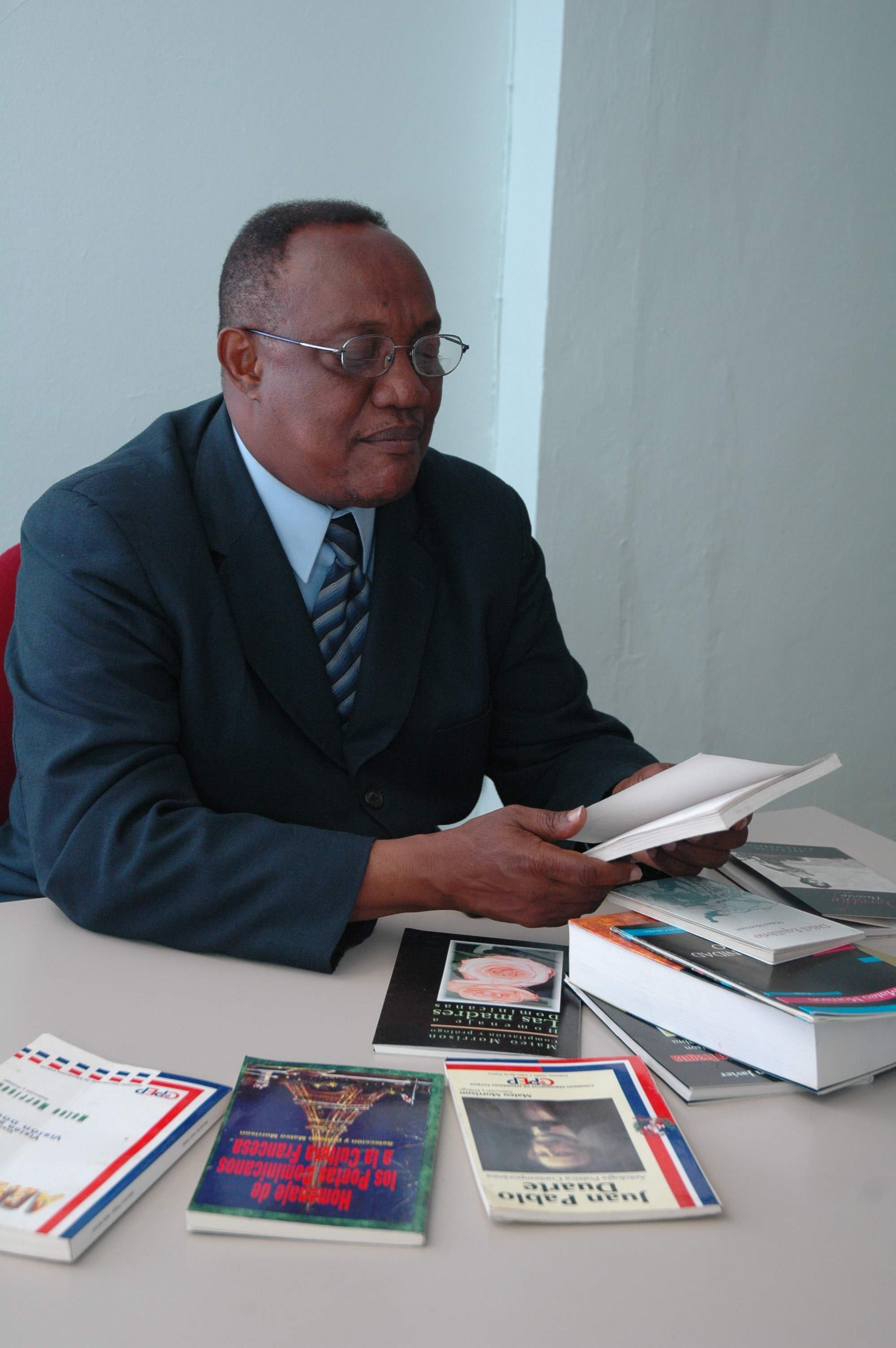 MATEO MORRISON (1946) Poeta y Abogado Republica Dominicana